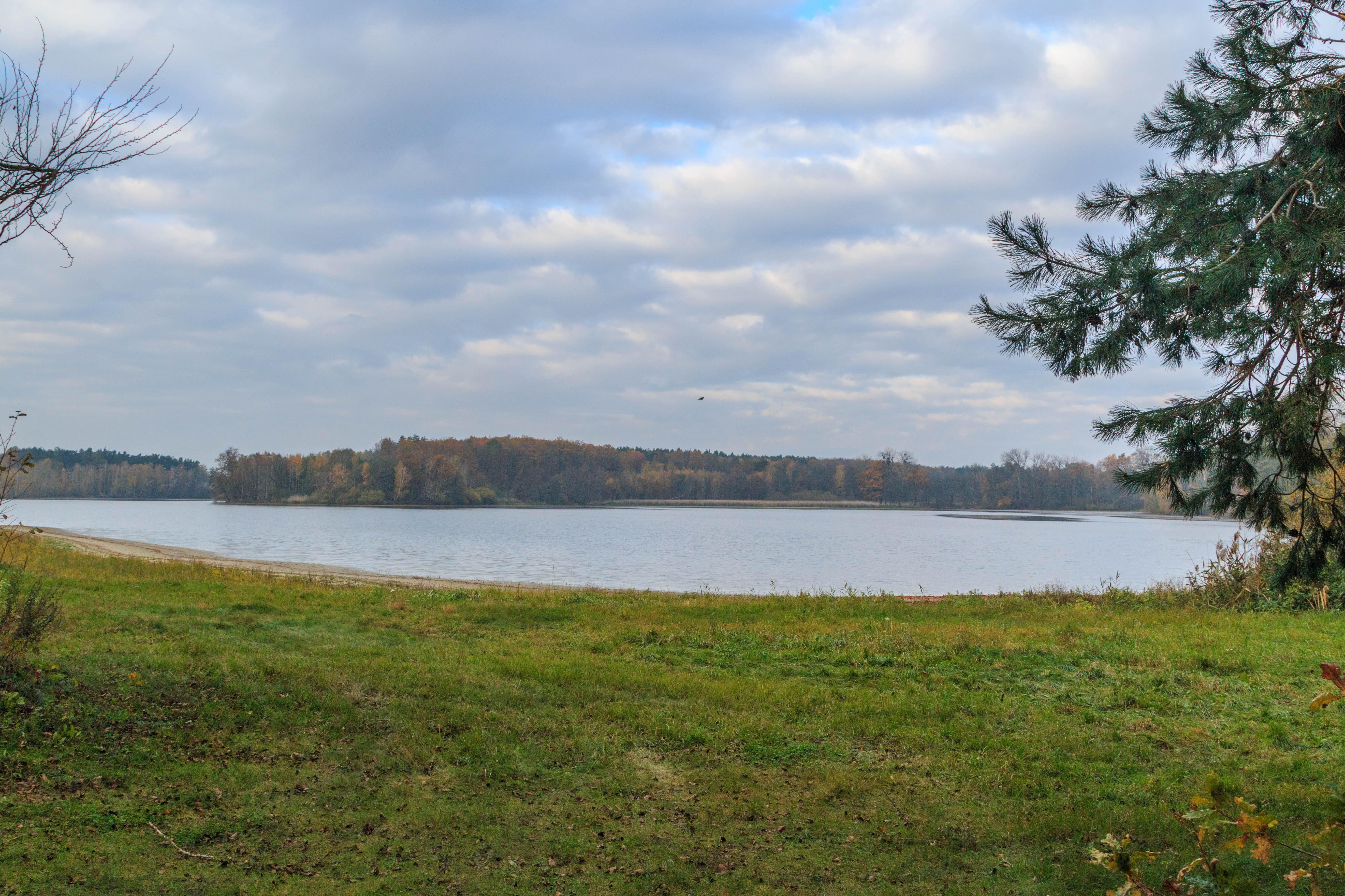 rybník Rozhrna u Neratova Project: Vodstvo.